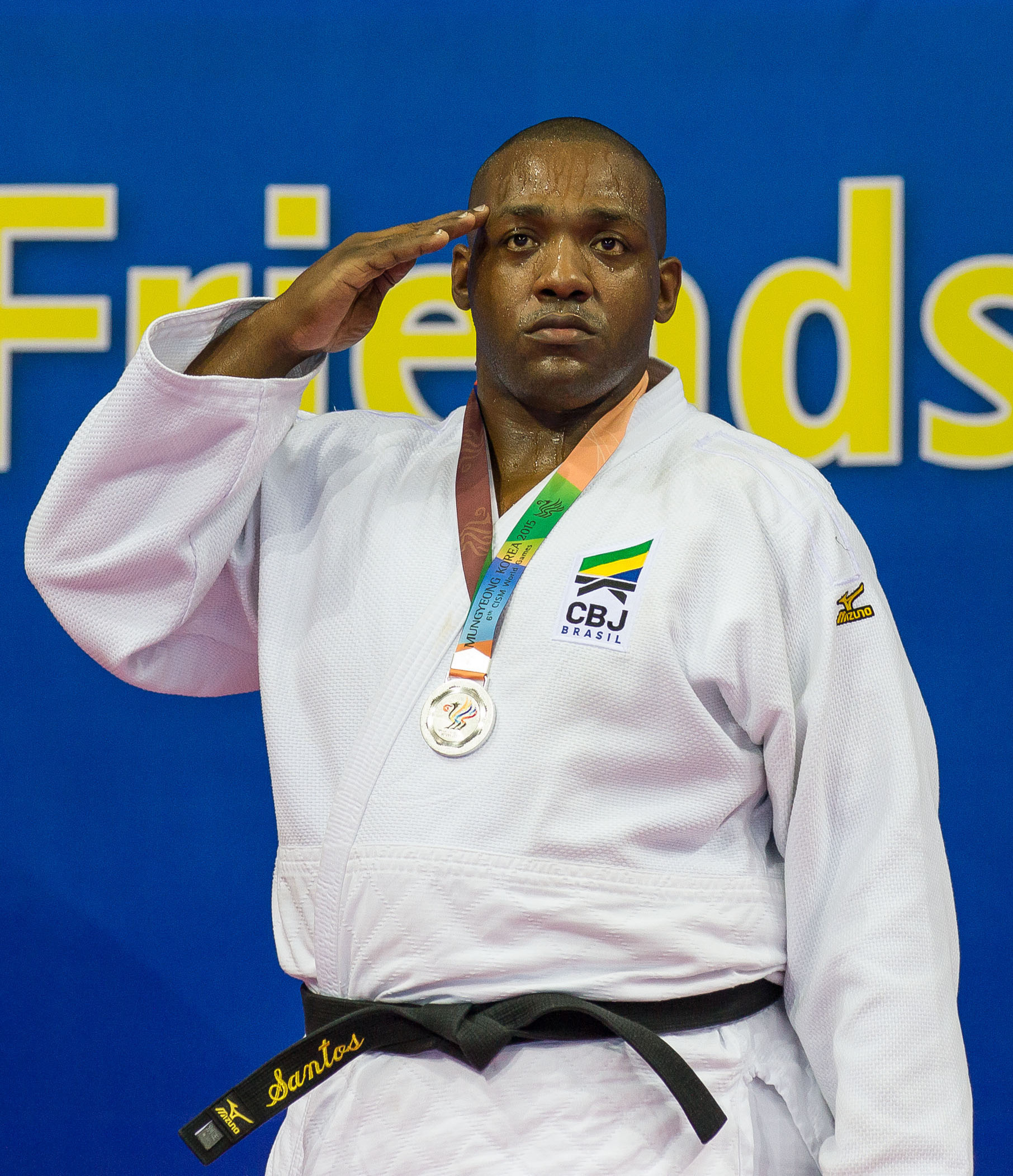 Walter Santos conquista uma medalha de prata para o Brasil no judô individual. Foto: Sgt Johnson Barros